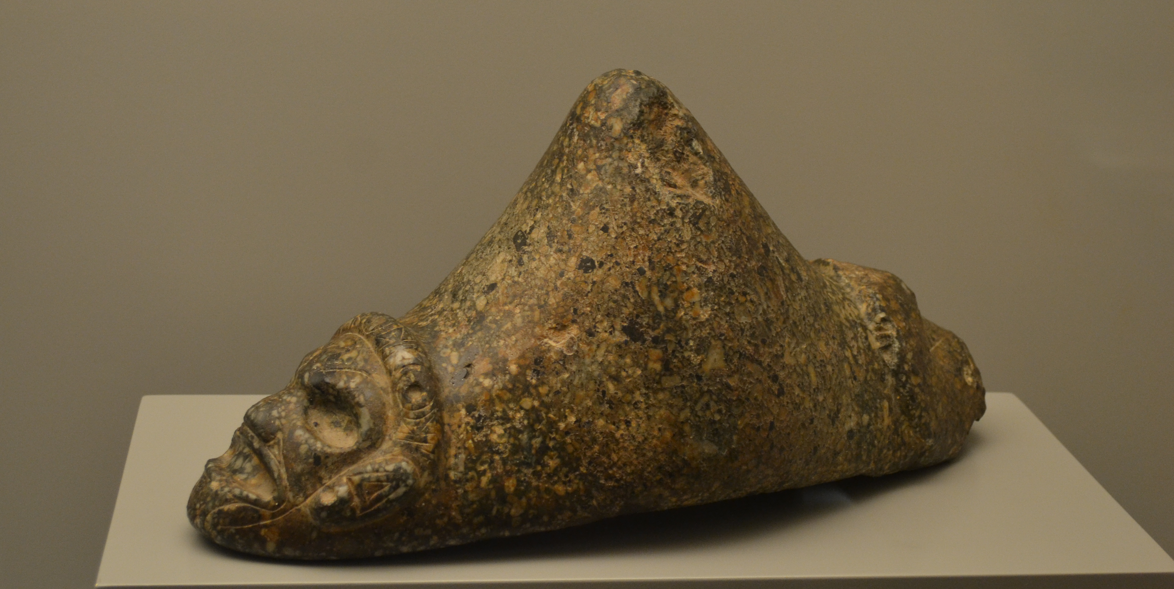 Trigonolito o piedra de tres puntas utilizado para propiciar la fertilidad. En uno de los extremos presenta un rostro con la boca abierta y sin dientes. Exhibe las cuencas oculares vacías, nariz bastante desbastada y orejas. Limitan el rostro dos líneas incisas, en forma de cinta, que podrían representar un atuendo ornamental o cofia. Cultura Taína. 1000-1500 d. C. Procedencia: Puerto Rico. Material: Granito. Altura: 145 cm; anchura: 35 cm; profundidad: 16 cm. Nº inv. 03318. Museo de América.